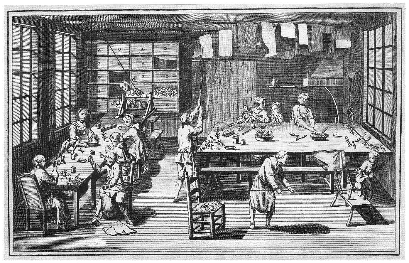 Werkstatt einer Blumenmanufaktur.Kupferstich.